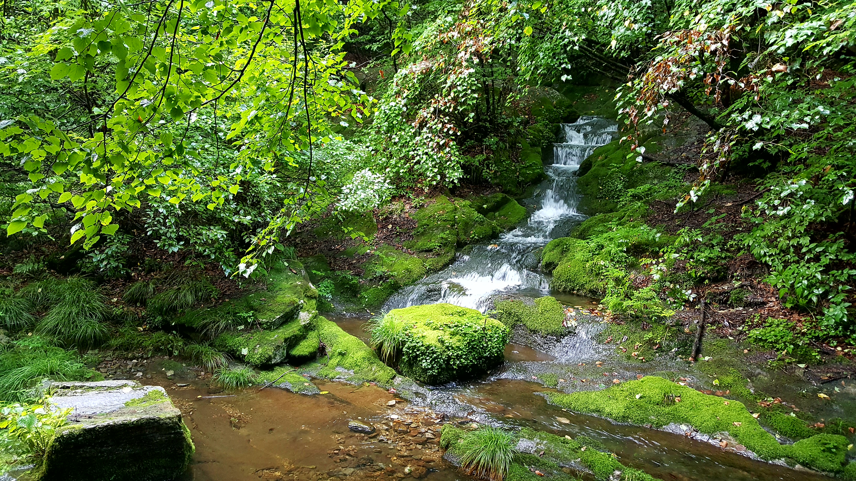 한강의 발원지인 검룡소